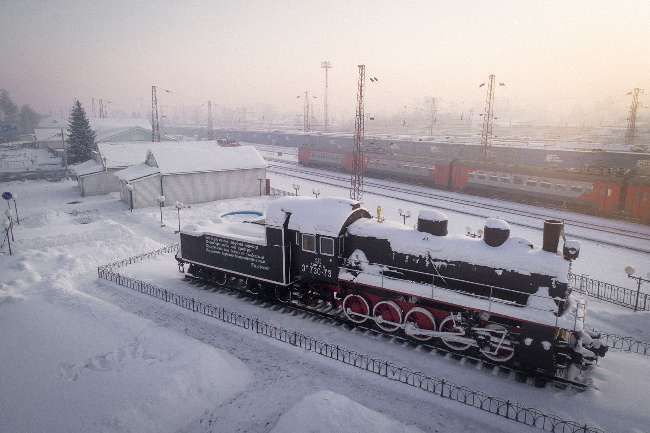 Паровоз - символ города железнодорожников